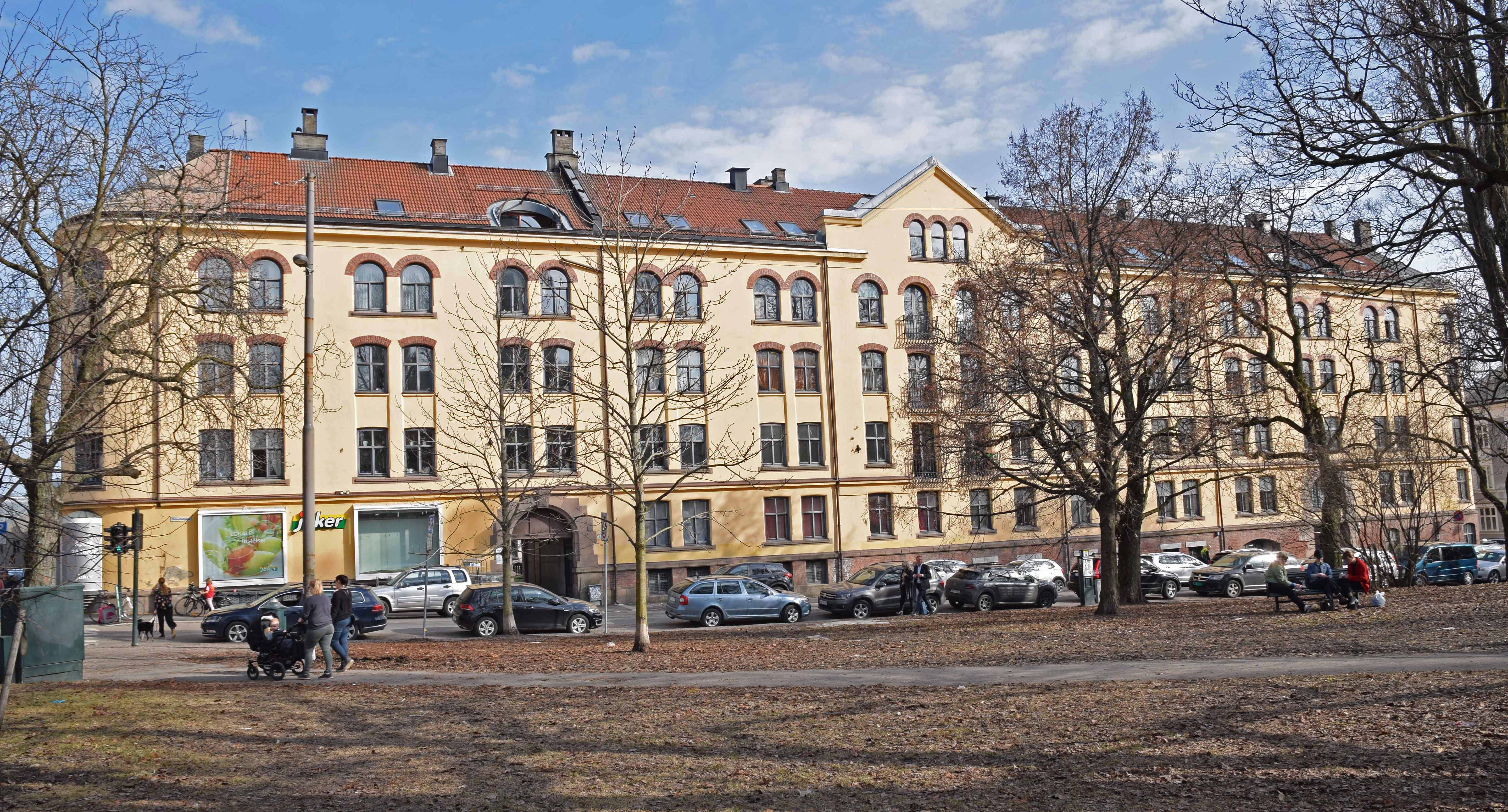 Dannevigsveien 7, Sagene, kommunal leiegård 1902, arkitekt Henrik Nissen